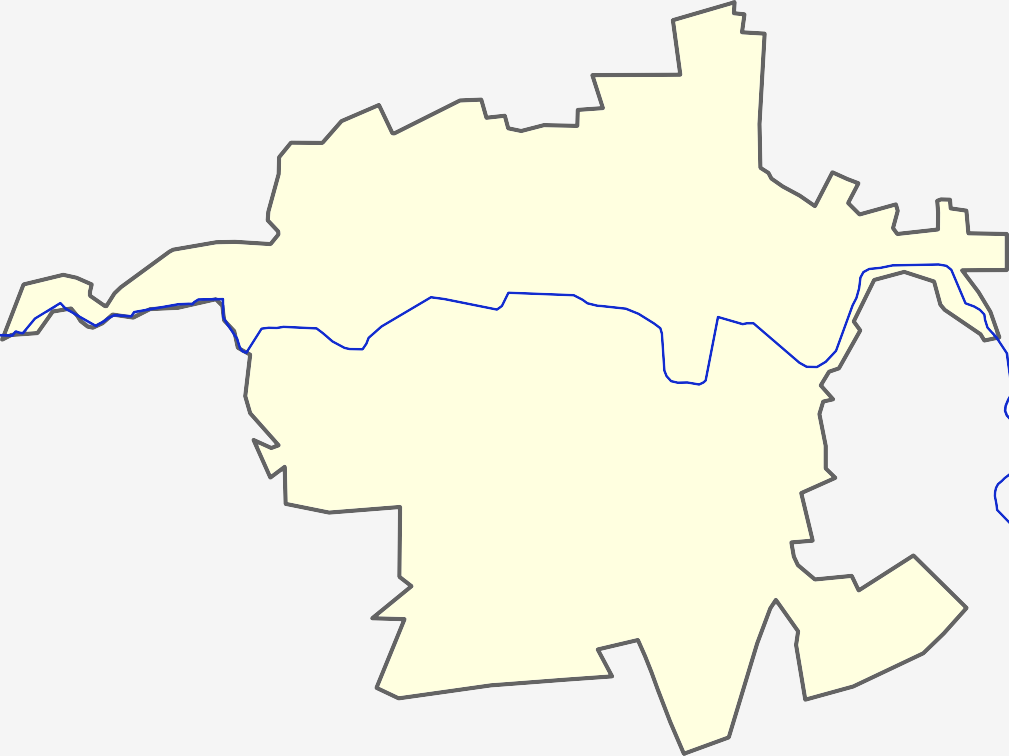 Panevėžio miesto žemėlapis.